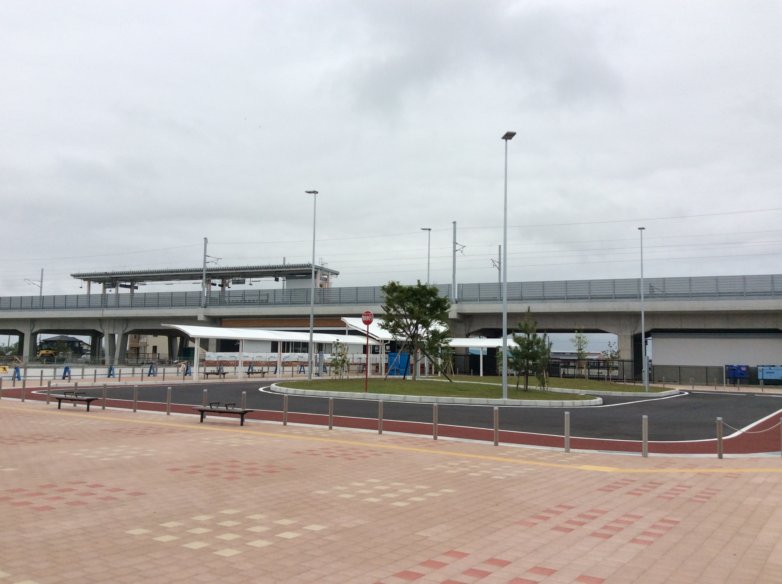 JR常磐線 山下駅（新駅 開業前）